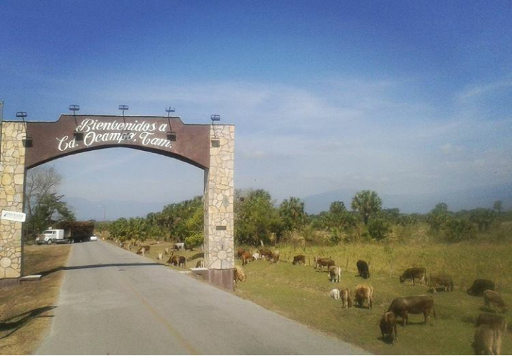 Entrada a municipio de Ocampo, Tamaulipas.